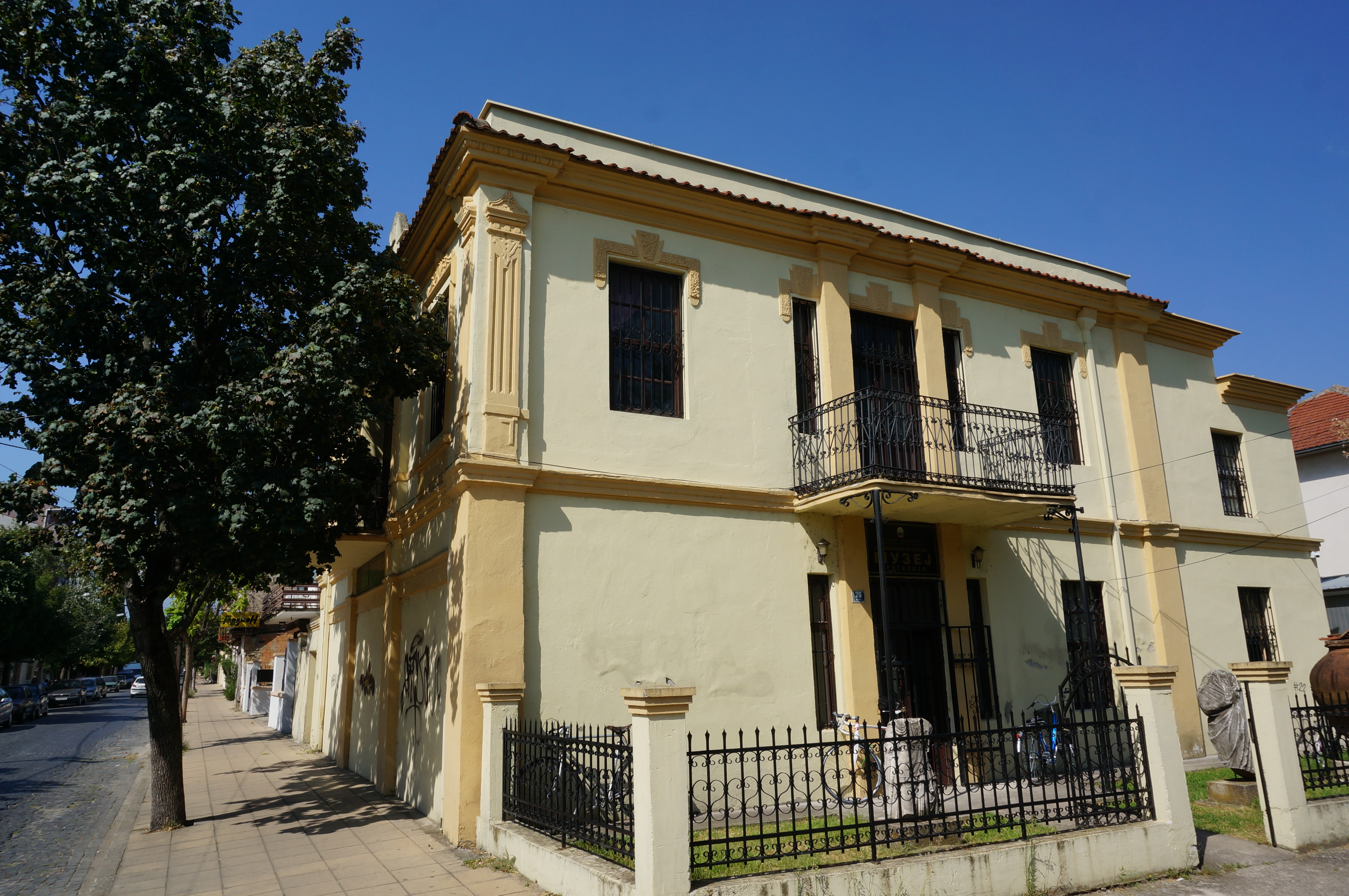 à Gevgelija.